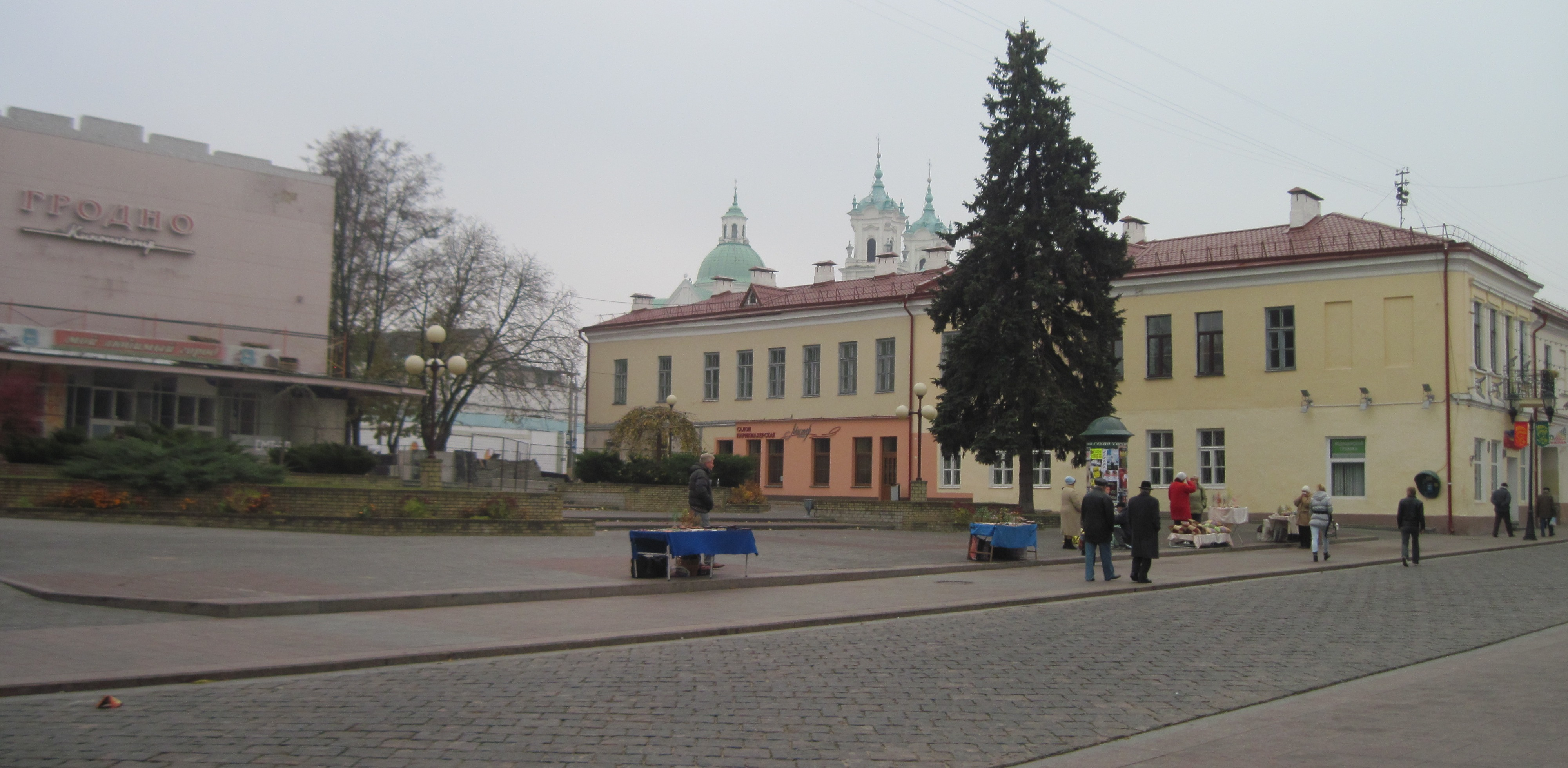 Беларуская (тарашкевіца): Здымак дамоў №7 і 9 па вуліцы Савецкая, г. Гродна